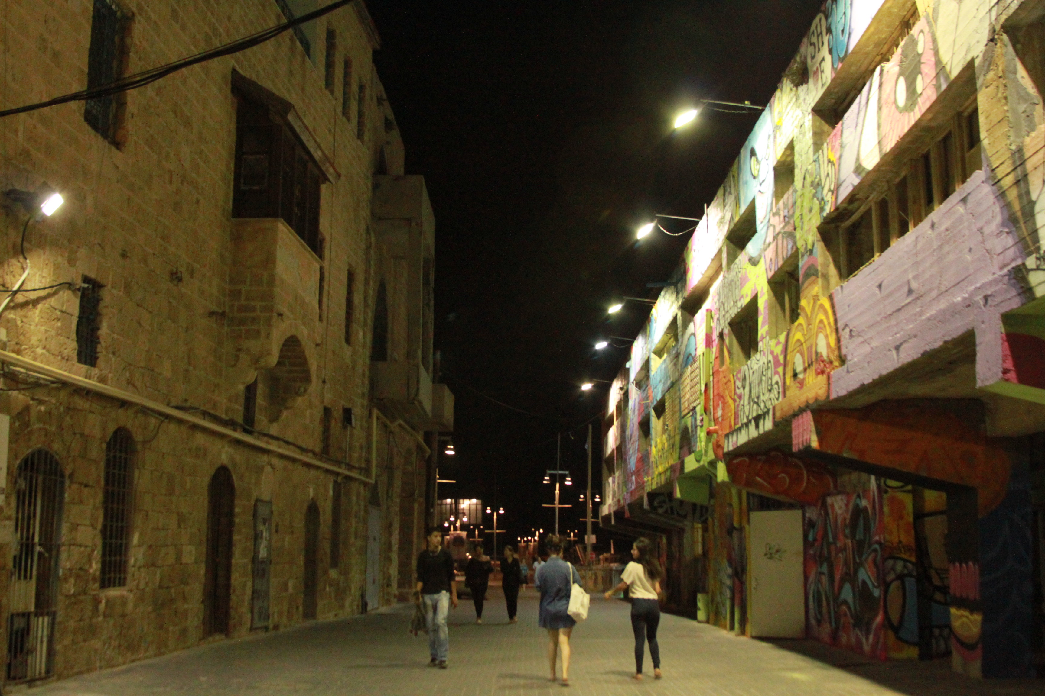 נמל יפו הוא נמל בחופה של יפו, ונחשב לאחד הנמלים העתיקים בעולם. נמל יפו היה הנמל הראשי של ארץ ישראל עד לאמצע תקופת המנדט הבריטי.